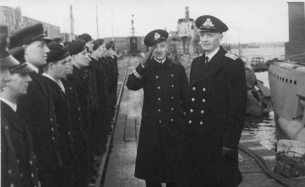 Fra overtakelsesseremonien for KNM Uredd 7. desember 1941. Kontreadmiral Elias Corneliussen (til høyre) inspiserer besetningen.